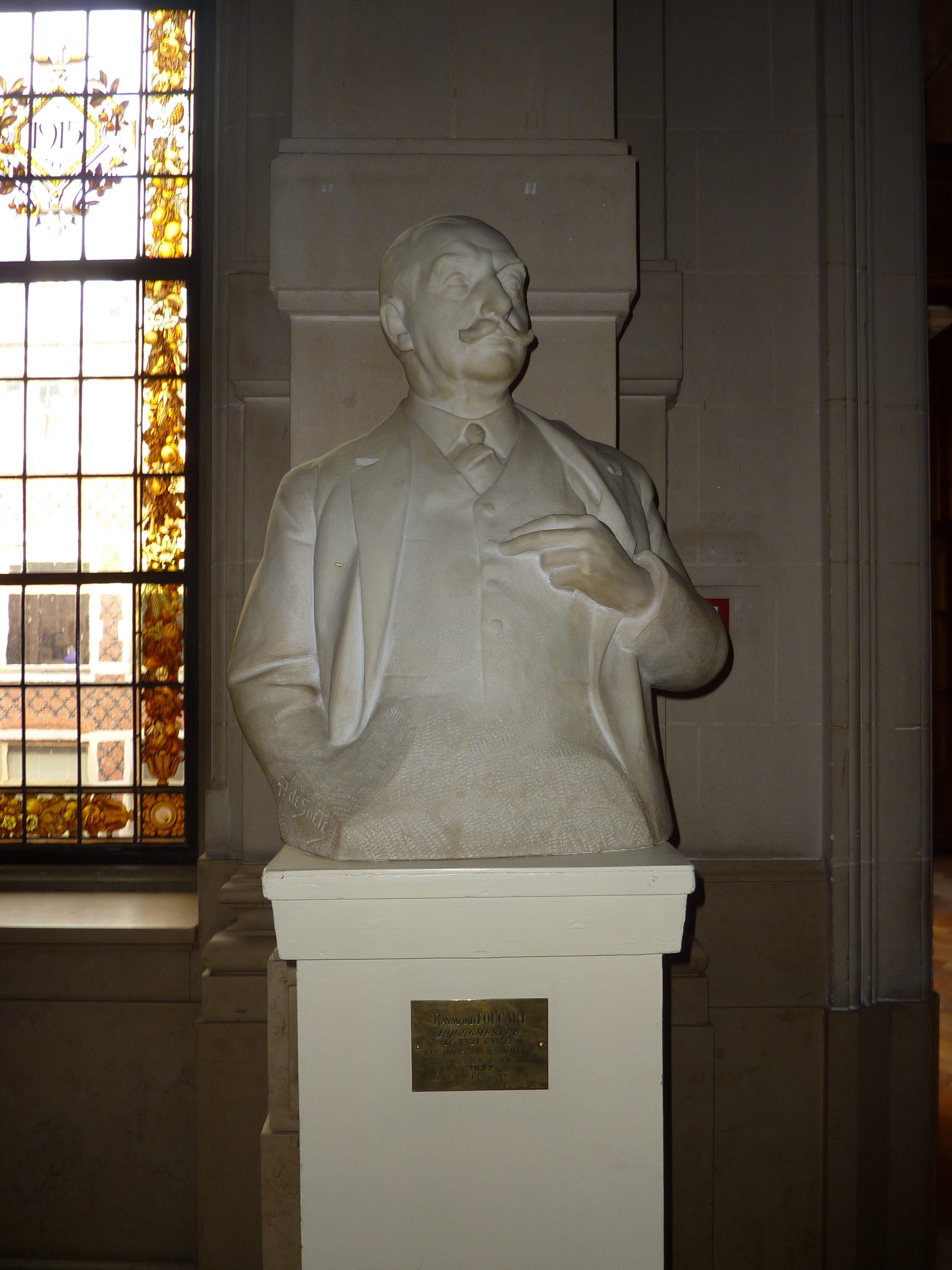 Buste de Raymond Foucart (Œuvre de Pierre De Soete)